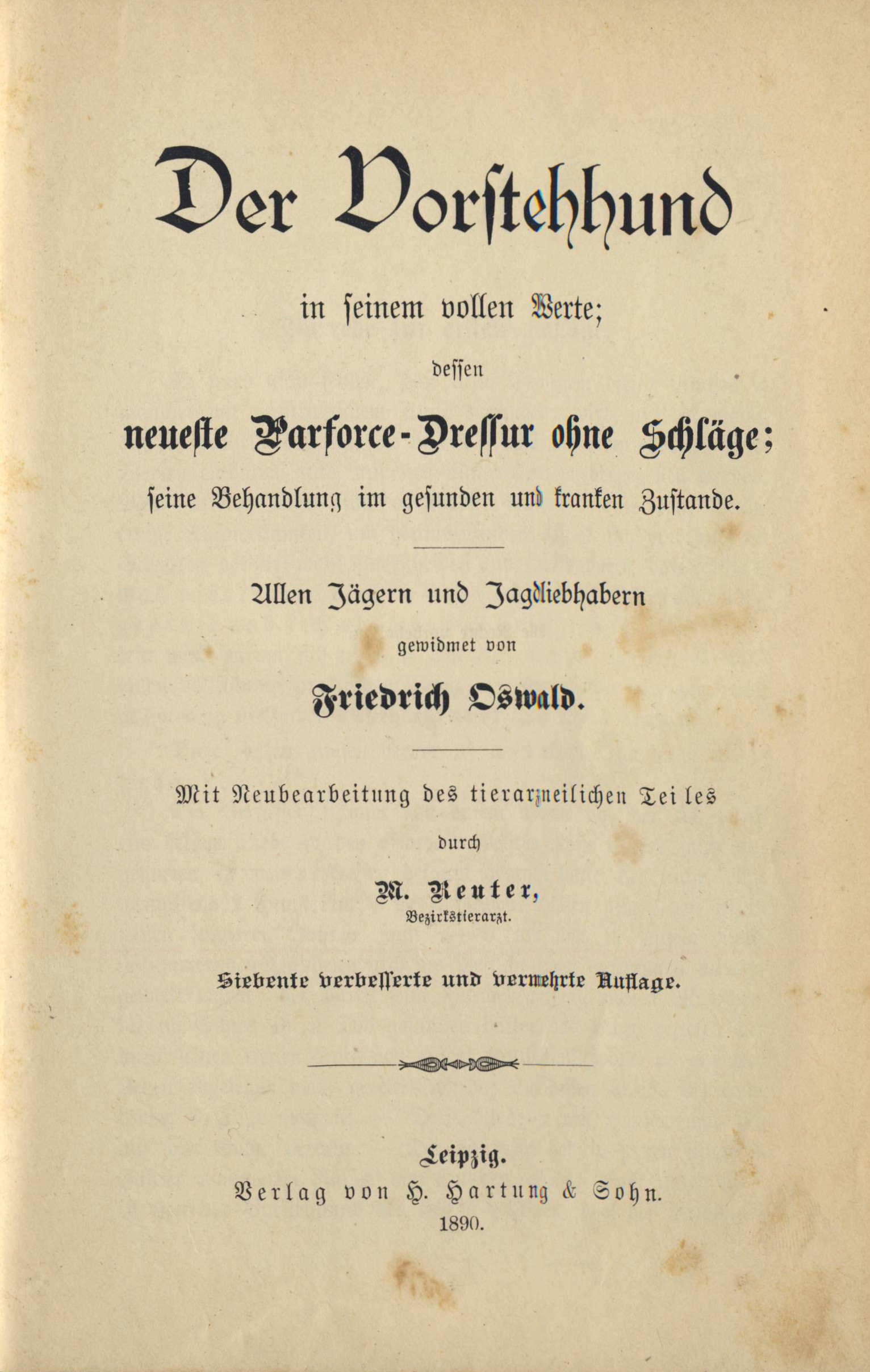 Titelbild des Buches "Der Vorstehhund in seinem vollen Werte", 1890